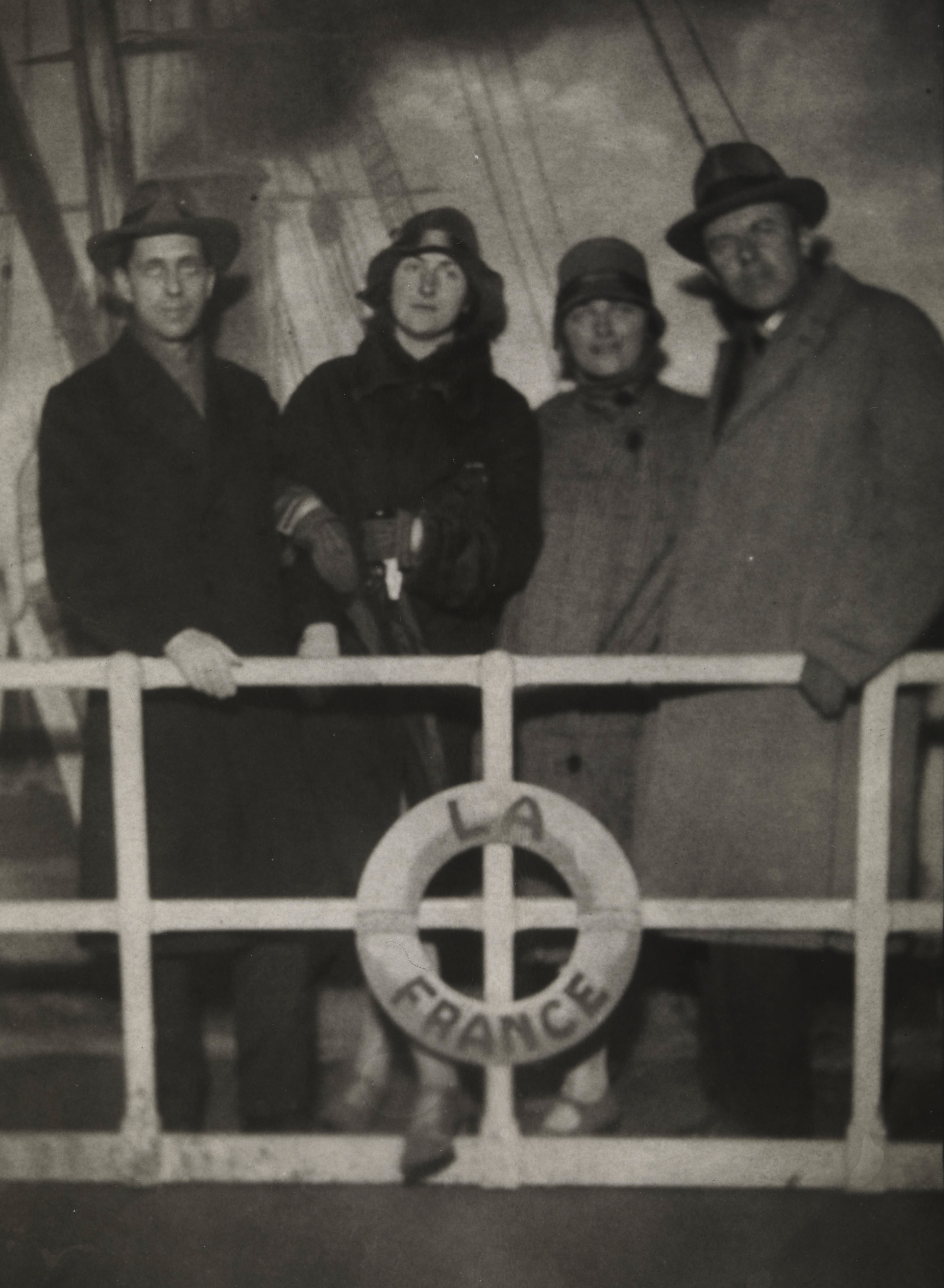 Bildet er hentet fra Nasjonalbibliotekets bildesamling Depicted person: Valen, Fartein